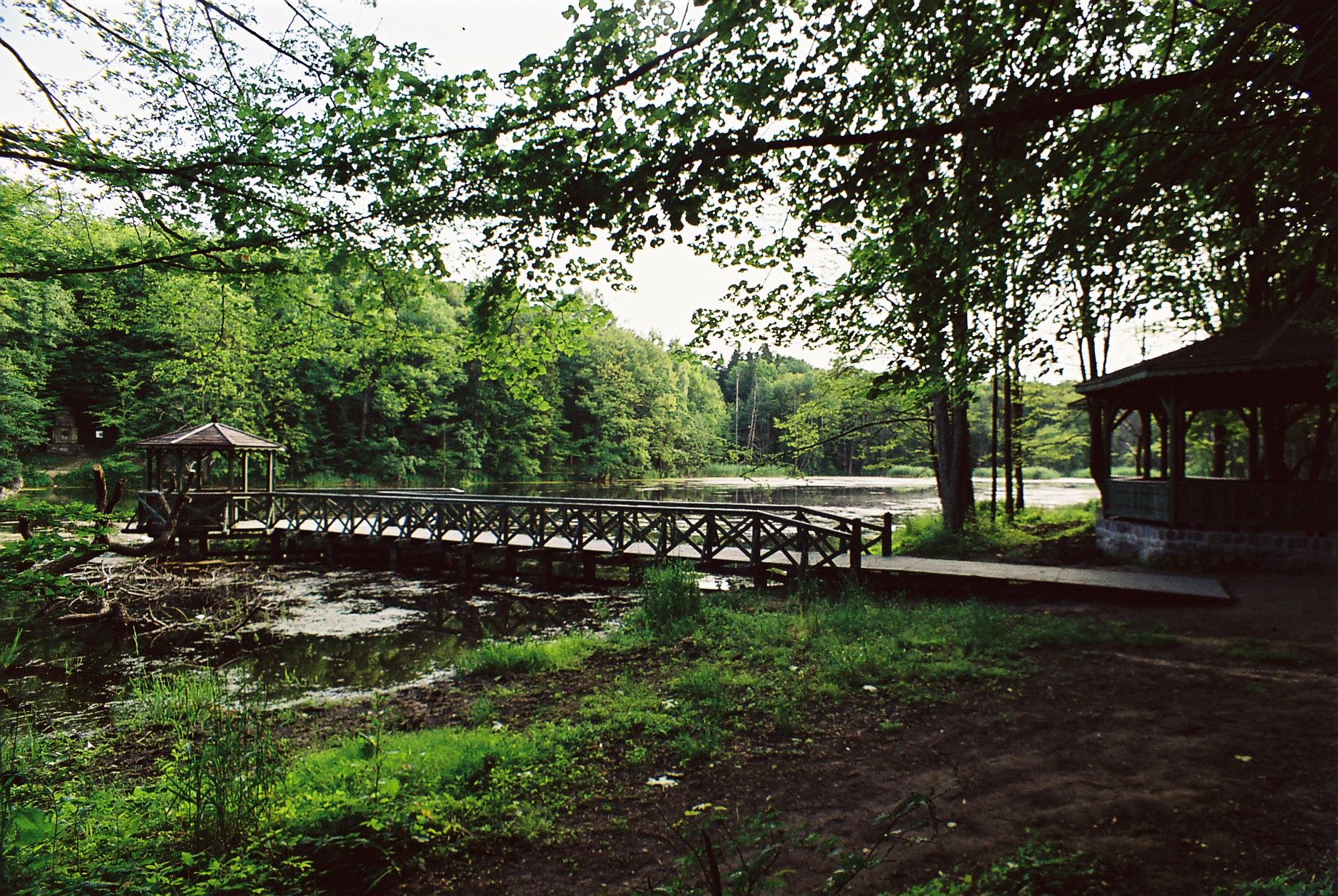 Autor: Adrian Grzegorz Rok wykonania: 2005